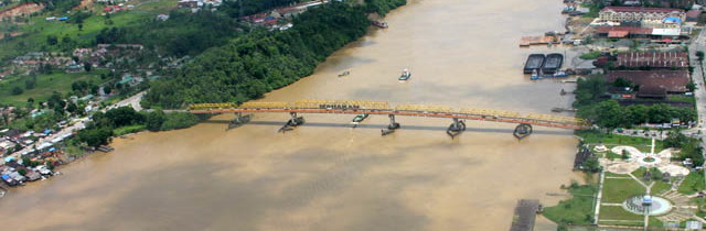 Mahakam bridge in Samarinda, East Kalimantan province, Indonesia